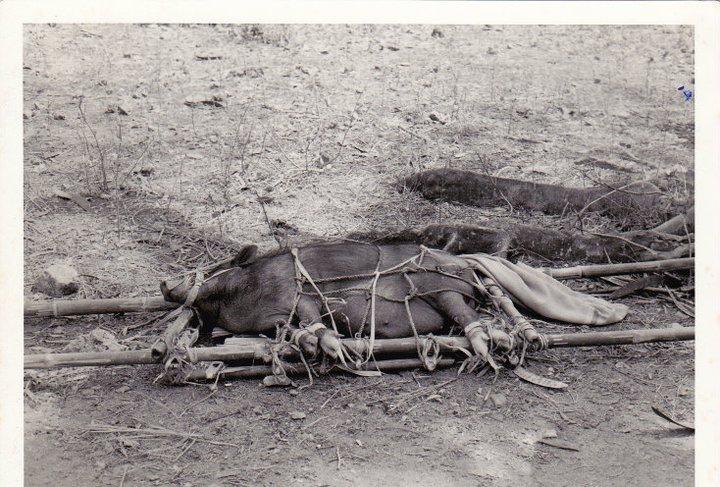 Porco preparado para ser transportado aos ombros-Cová (fronteira com a Indonésia)